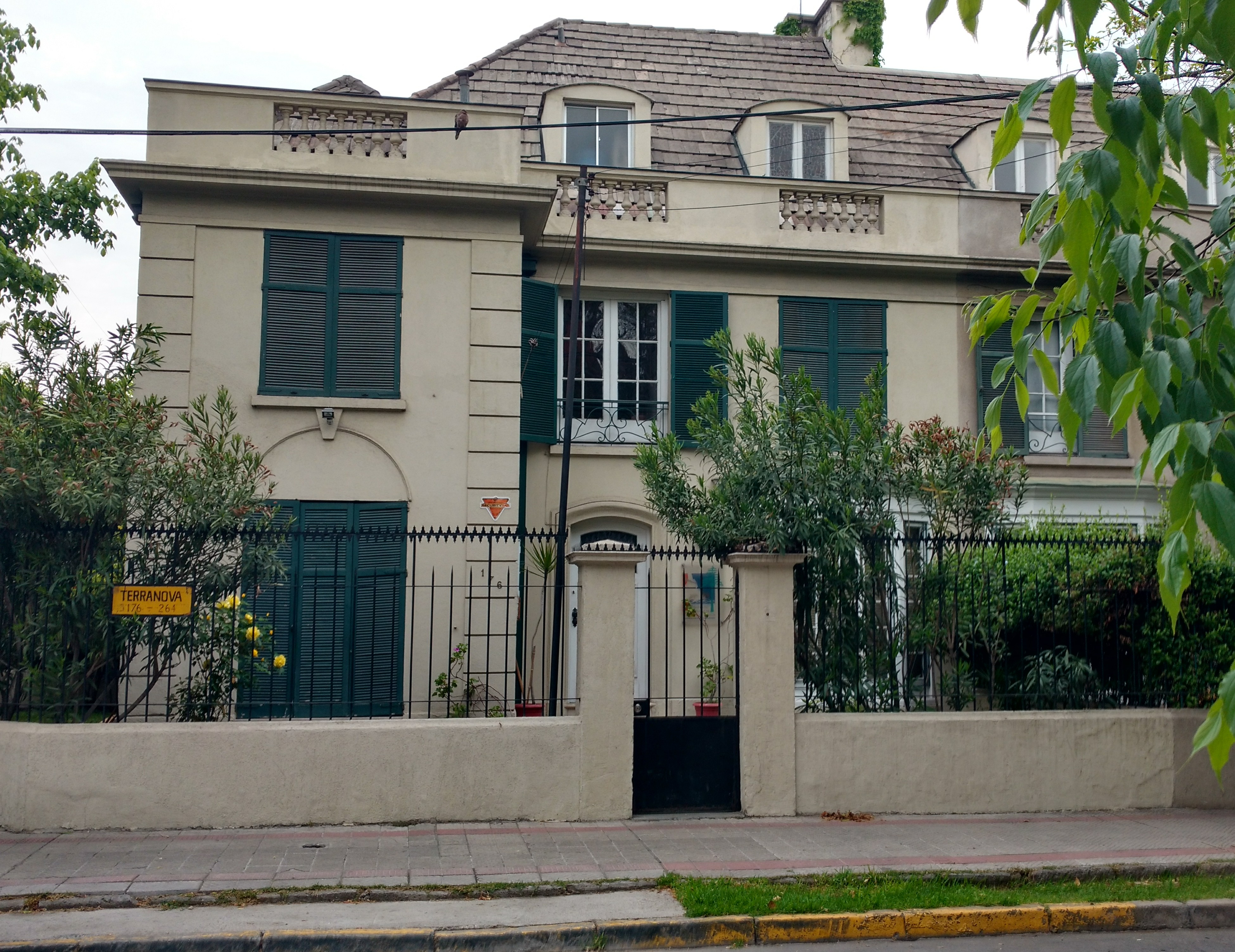 Instituto Chileno de Campos de Hielo